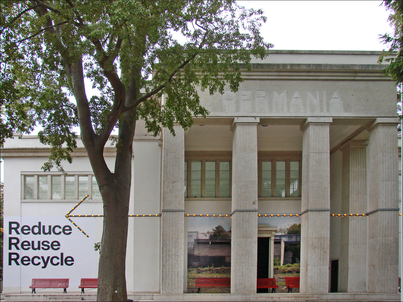 Façade du pavillon national de l'Allemagne indiquant que l'entrée s'effectue à l'arrière Exposition autour des 3 R : Reduce / Reuse / Recycle Valoriser ce qui existe en Allemagne doit être le premier objectif à atteindre en architecture. C'est une source d'inspiration et de motivation pour le développement urbain. La démarche privilégiée est de tirer parti des ressources architecturales et de prendre de nouvelles orientations à partir de l'existant dans un pays comme l'Allemagne dont la population est vieillissante. Réduire / Réutiliser / Recycler sont les nouveaux mots d'ordre. Le pavillon, que l'on parcourt symboliquement sur des passerelles utilisées à Venise au moment de l'acqua alta, présente de manière sommaire quelques projets représentatifs de cette approche des 3R. Parmi ceux-ci, figure la réutilisation à Saint Nazaire de la base sous-marine. (Voir une photo : AFF Architekten, Berlin / AMUNT Architekten Martenson und Nagel Theissen, Aachen, Stuttgart / Atelier Kempe Thill Architects and Planners, Rotterdam / Brandlhuber+ ERA, Emde, Schneider, Berlin / Diener & Diener Architekten, Basel, Berlin / Urs Füssler, Berlin/Jörg Leeser, Cologne / Heinle, Wischer und Partner, Stuttgart / Hild und K Architekten, Munich / knerer und lang Architekten, Dresden / LIN Architects Urbanists, Berlin / Meixner Schlüter Wendt Architekten, Frankfurt am Main / RobertneunTM, Berlin / Schulz & Schulz, Leipzig / Staab Architekten, Berlin Site officiel du pavillon de l'Allemagne reduce-reuse-recycle.de/ __________ Le premier pavillon de l'Allemagne a été conçu en 1909 pour accueillir les artistes de la Secession munichoise. Il a été démoli en 1938 sur ordre d'Hitler pour être remplacé par un bâtiment conçu par l'architecte allemand Ernst Haiger dans le style national-socialiste.